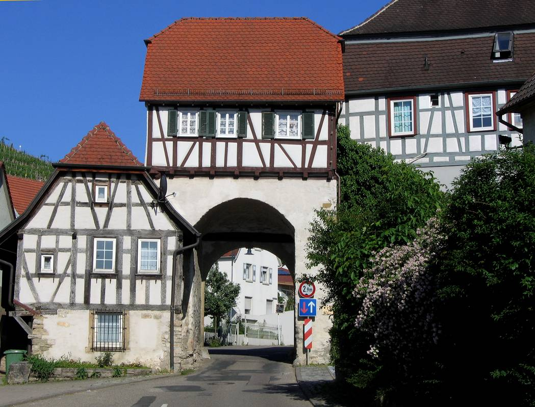 Mundelsheim, Stadttor